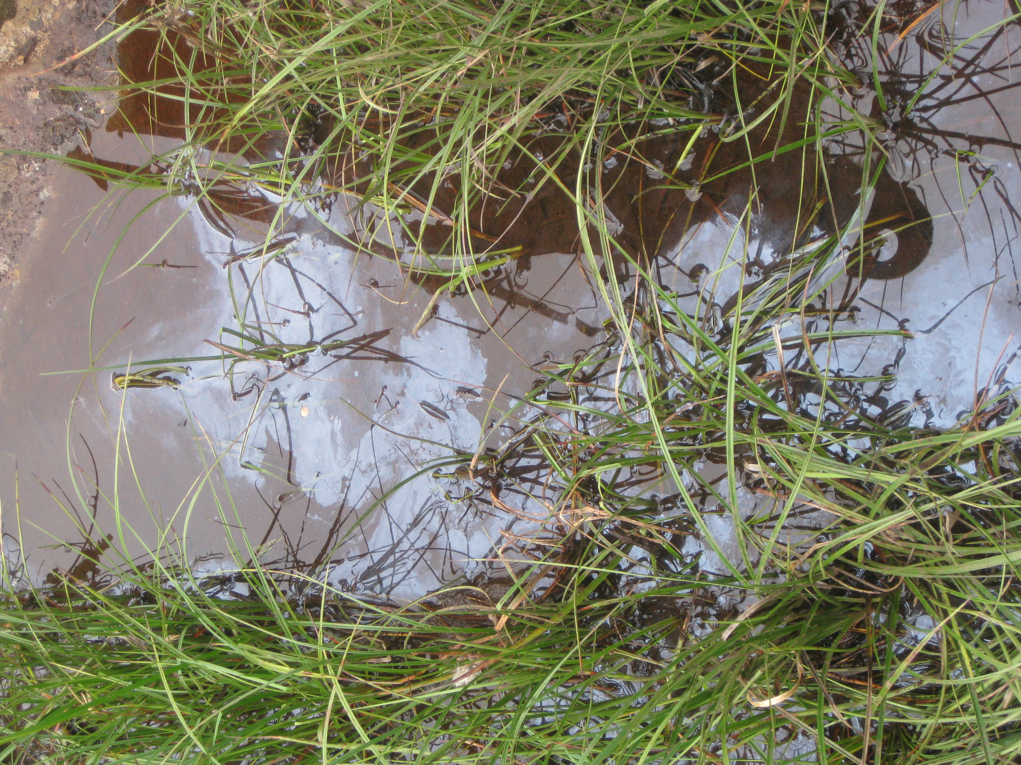 Kahmhaut